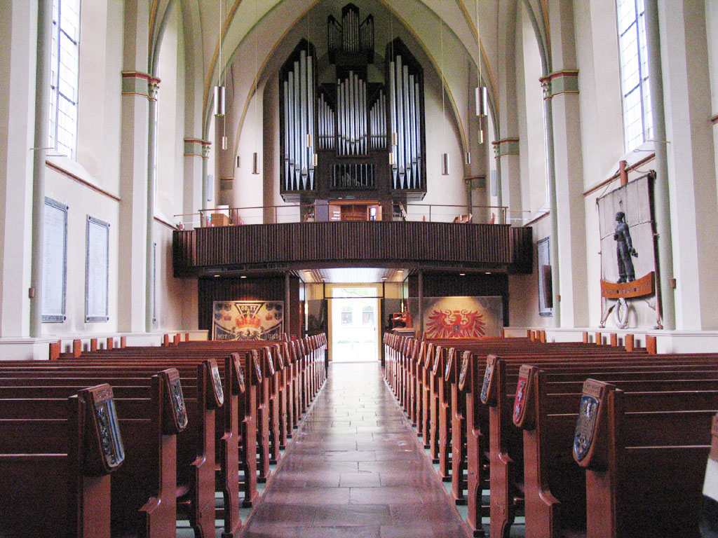 Christus- und Garnisonkirche in Wilhelmshaven, Orgel und Innenraum